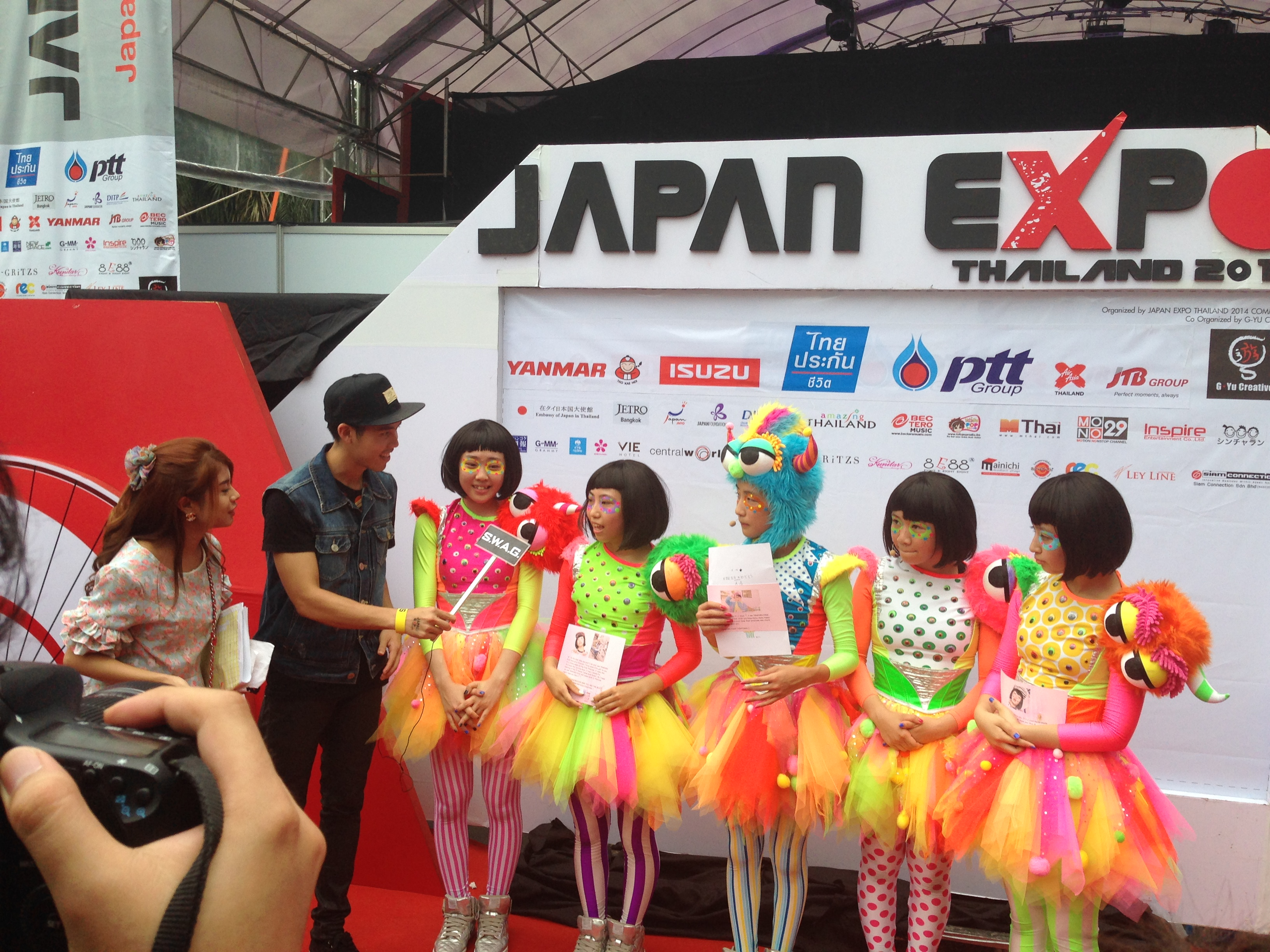 Tempura Kidz in Bangkok.